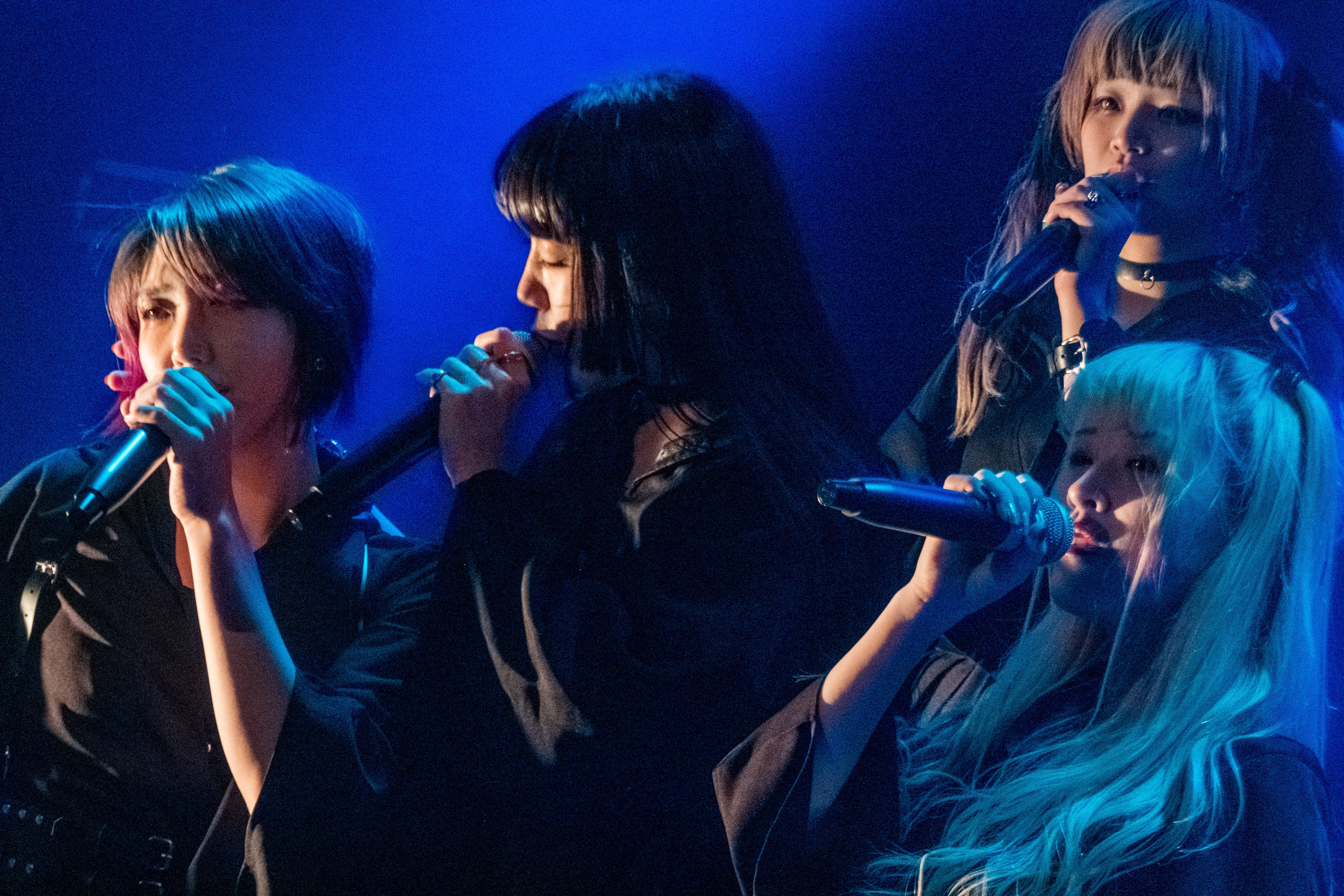 NECRONOMIDOL 20200625 Live at the Shibuya Chelsea Hotel